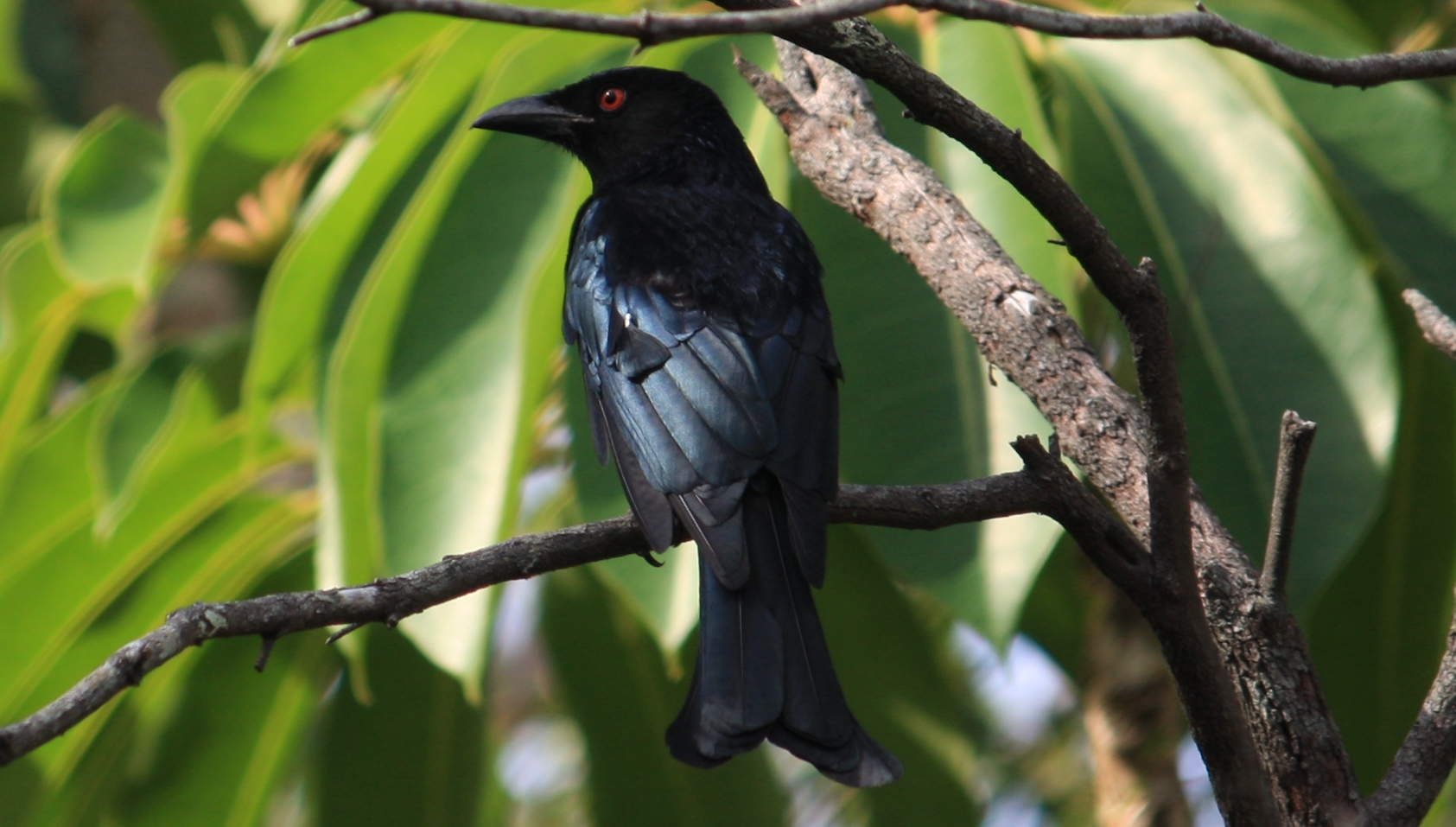 Spangled Drongo, Byron Bay NSW - Australia, April 22 2014.